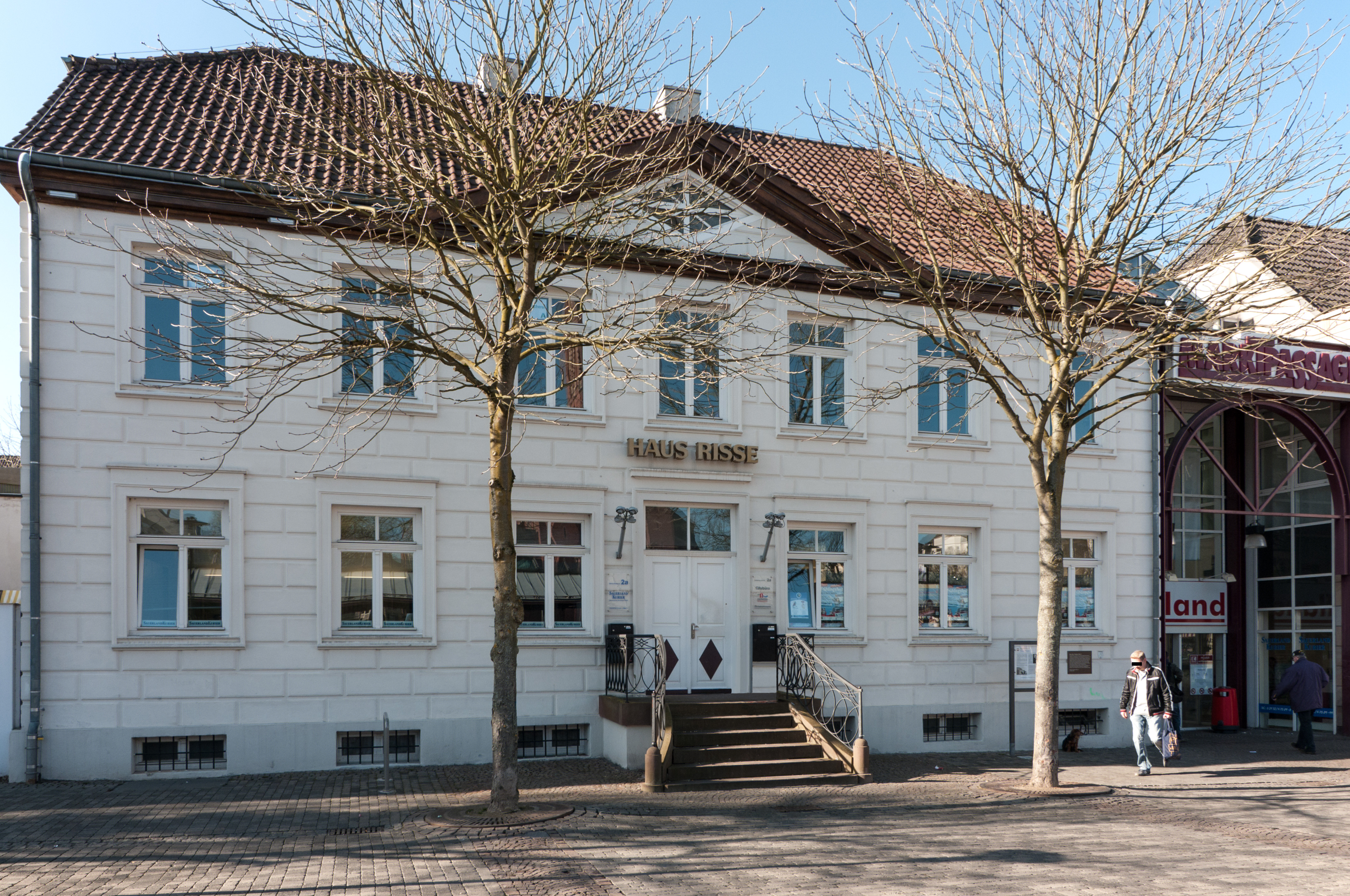 Neheim Marktplatz: Haus Risse This image shows a heritage building in Germany, located in the North Rhine-Westphalian city Arnsberg (no. DL 167).